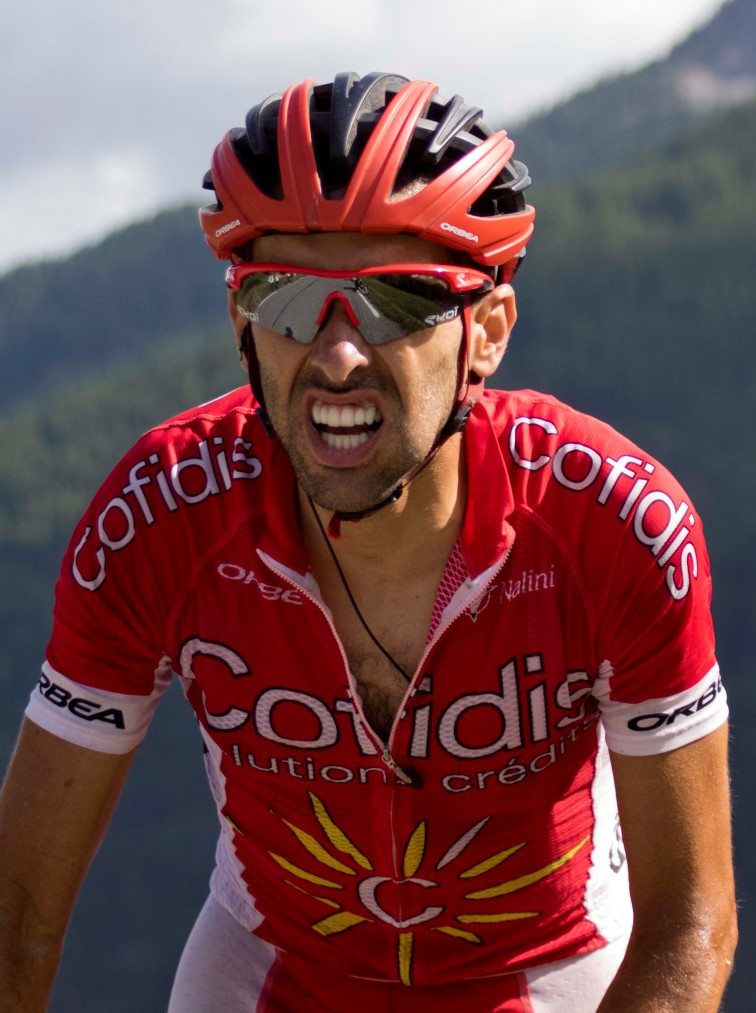 20-7_2 navarro